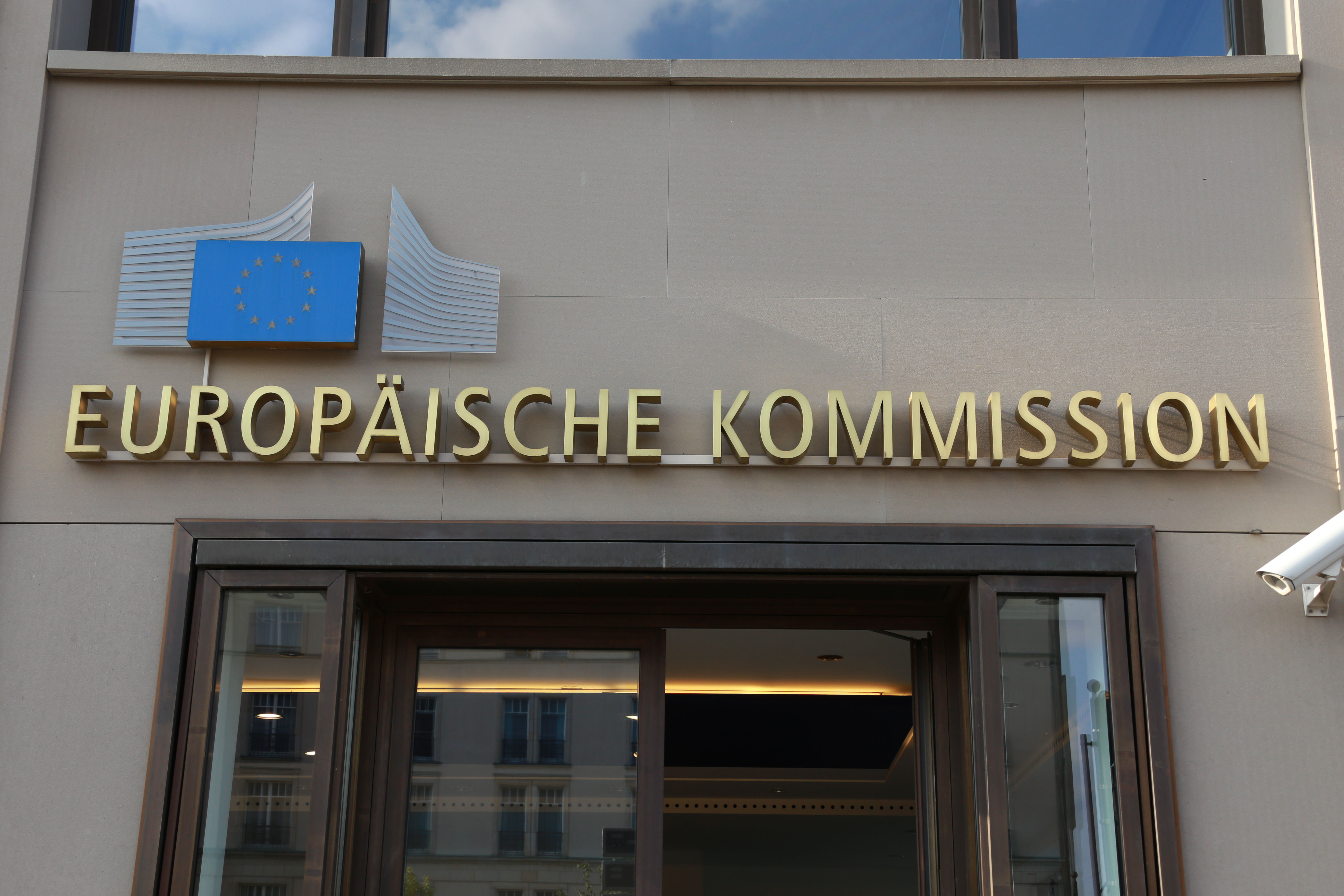 Europäische Kommission, Europa-Punkt Berlin Informationsbüro der EU, Europäisches Haus Berlin